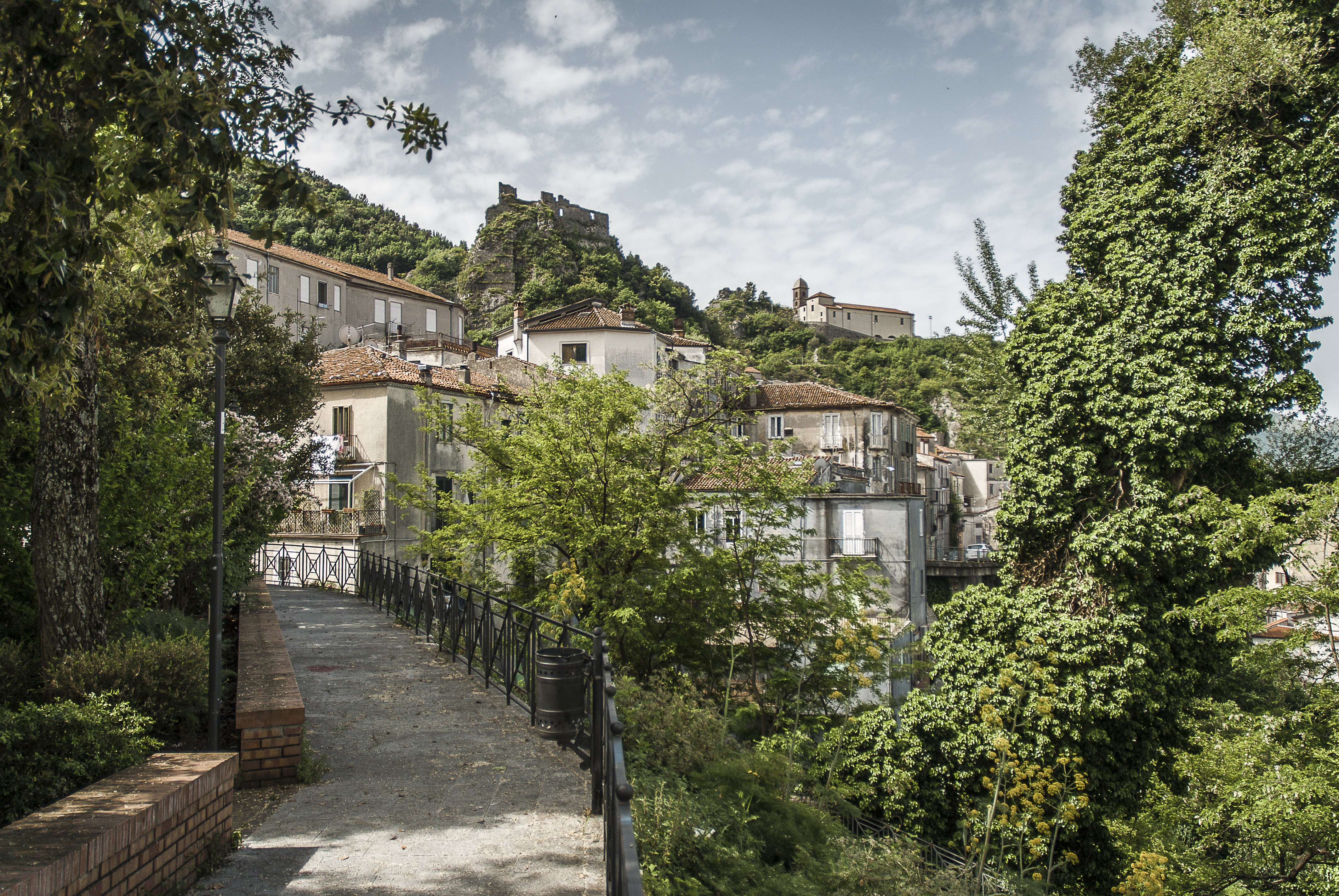 castello Ruggero This is a photo of a monument which is part of cultural heritage of Italy.